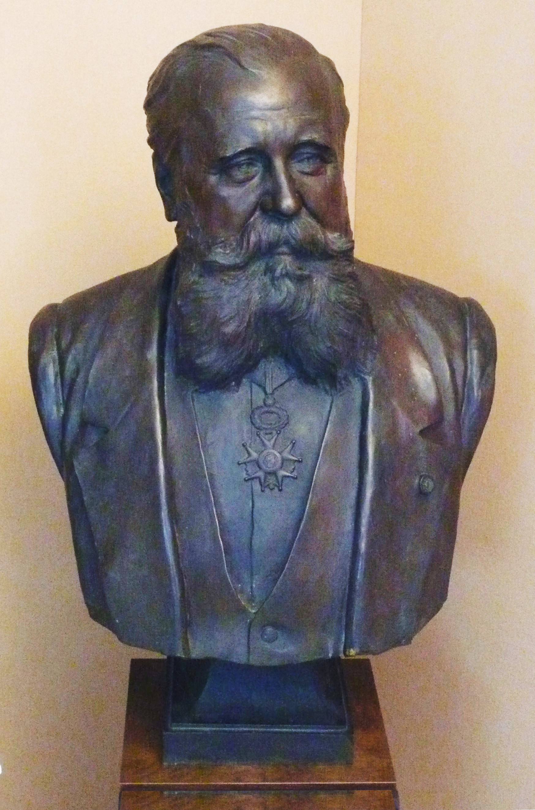 Buste Moisanr, propriété famille Savey